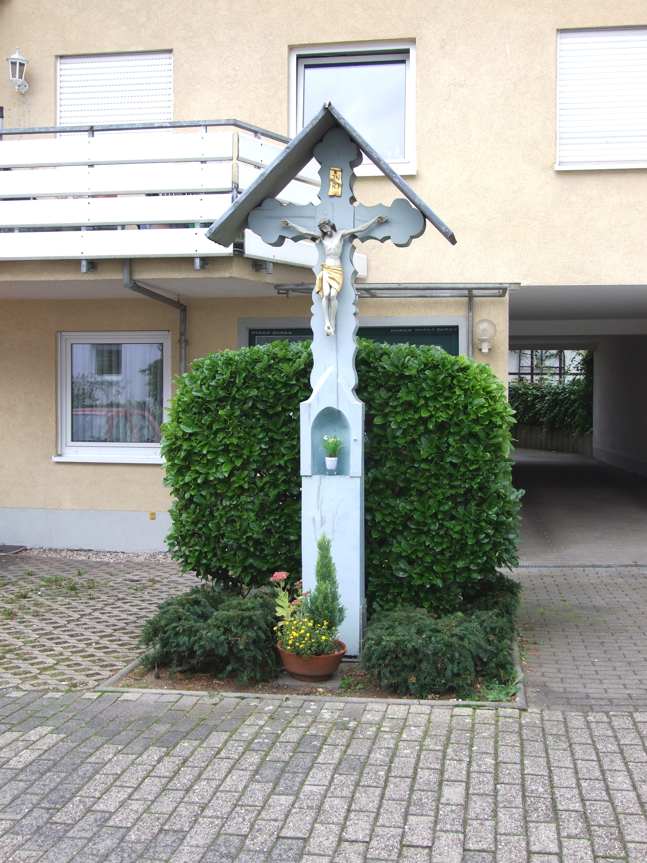 Bergisch Gladbach, Denkmal Nr. 96 Vorderansicht